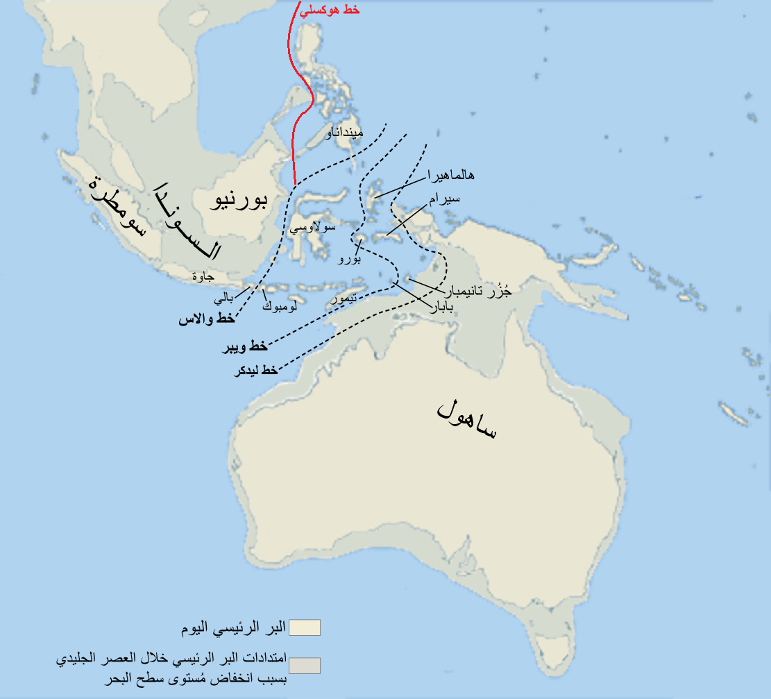 خريطة لجنوب شرق آسيا وأستراليزيا تُقارن حُدُود اليابسة ما بين اليوم والعصر الجليدي الأخير.